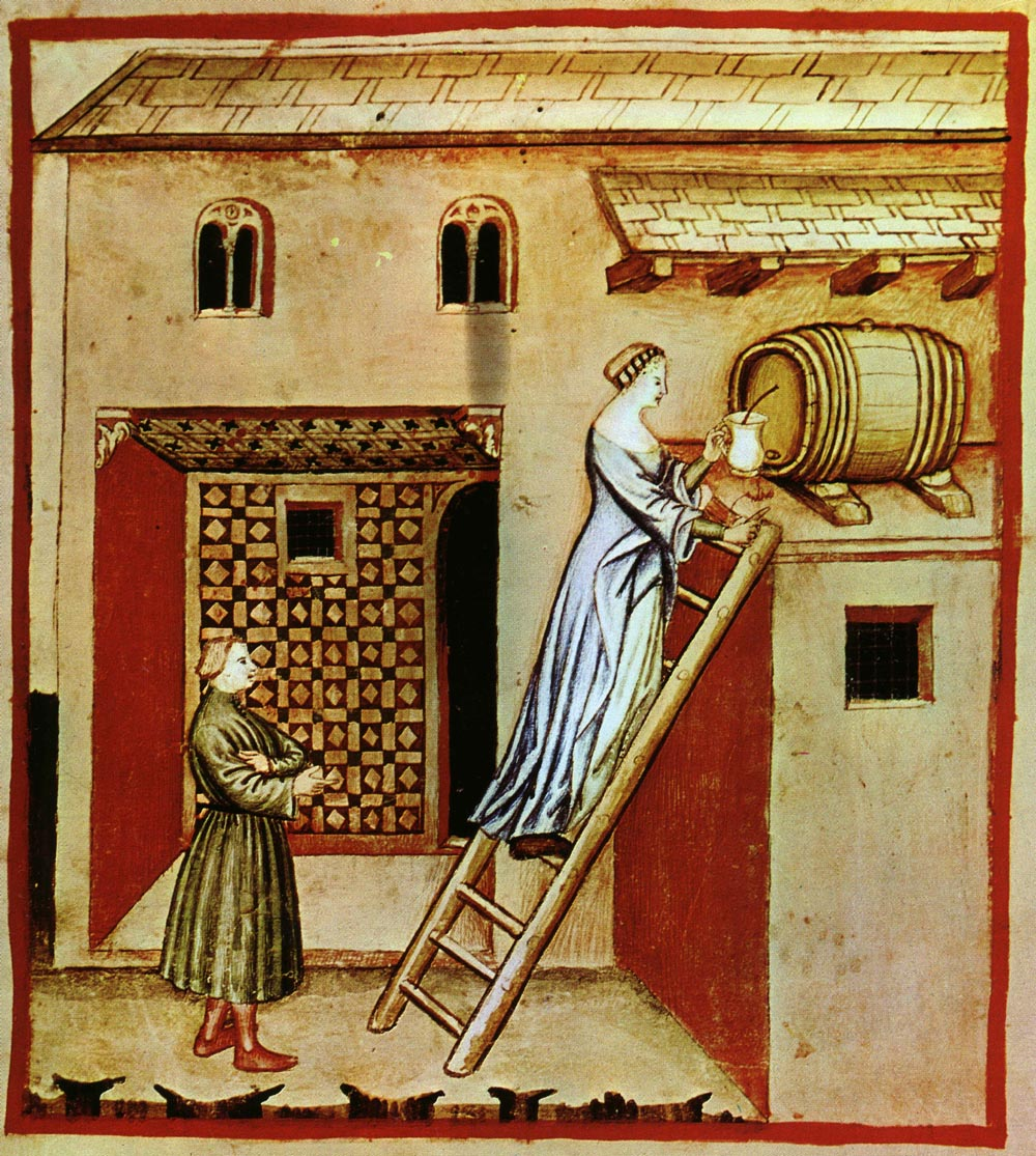 Tacuina sanitatis (XIV century)